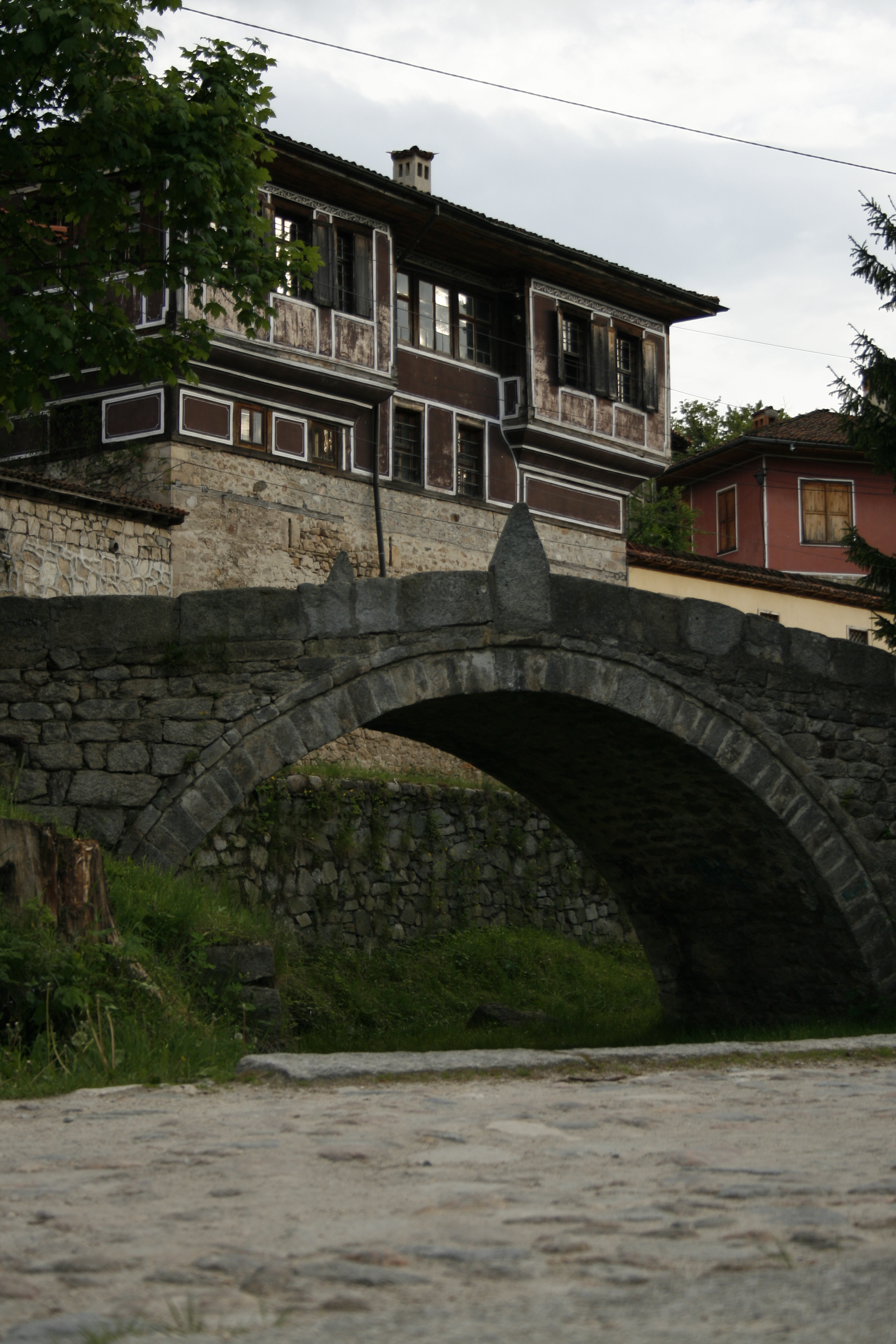 Бозова къща и Калъчев мост